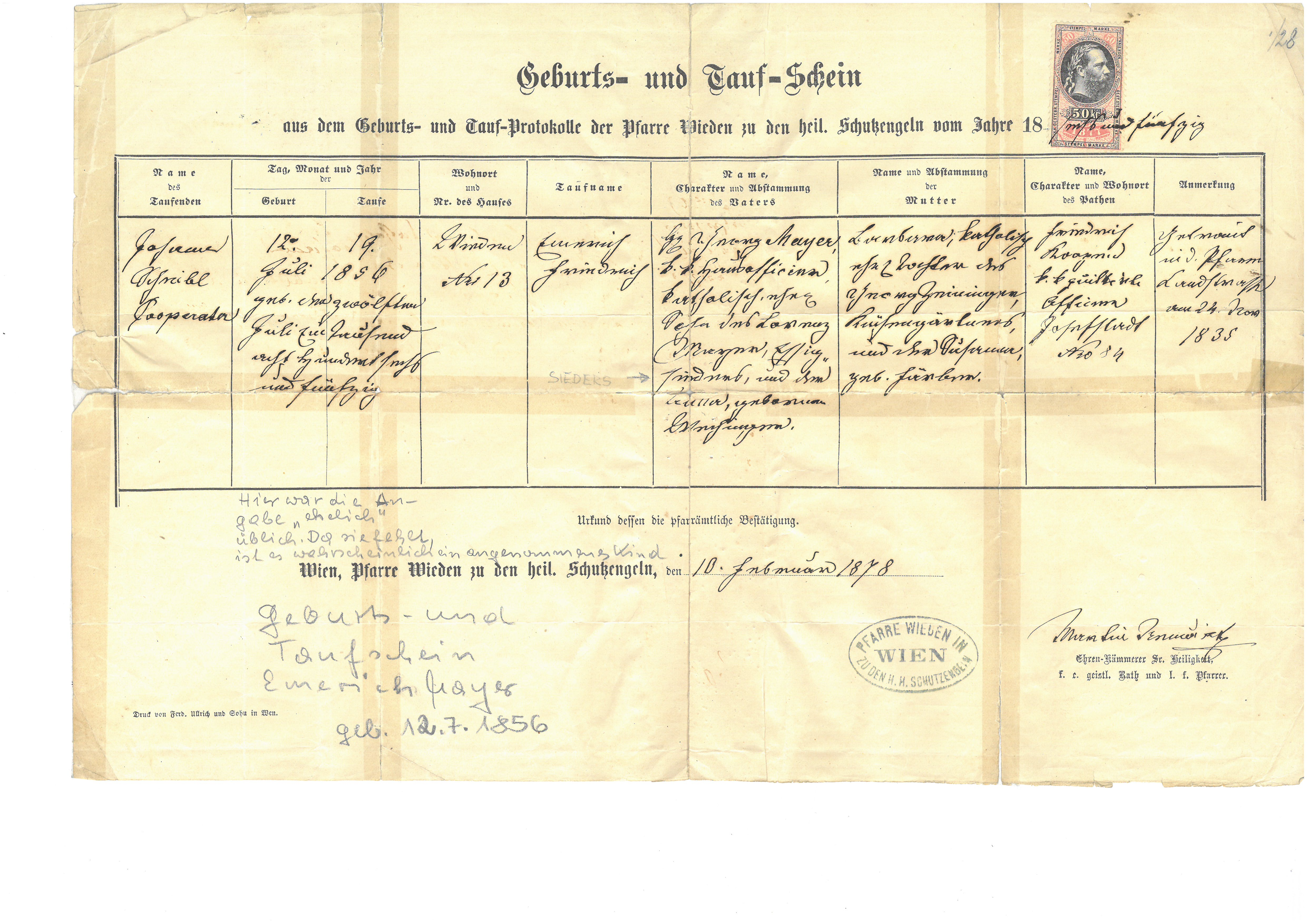 Geburtsurkunde von Emerich Mayer (geb. 12.Juli 1856 in Wien, gest. 25. August 1928 in Darmstadt). Abschrift/Bestätigung vom 10. Februar 1878. Handschriftliche Notizen von Enkel Walter Mayer. Emerich Mayer behauptete auf dem Sterbebett, ein angenommenes Kind aus dem Habsburger Hof zu sein, woraufhin Walter Mayer Belege und Indizien für diese Behauptung suchte. Emerich Mayer war 1895 Gründungsdirektor der Hessischen Obst- und Weinbauschule in Oppenheim (heute: Staatliche Weinbaudomäne Oppenheim).